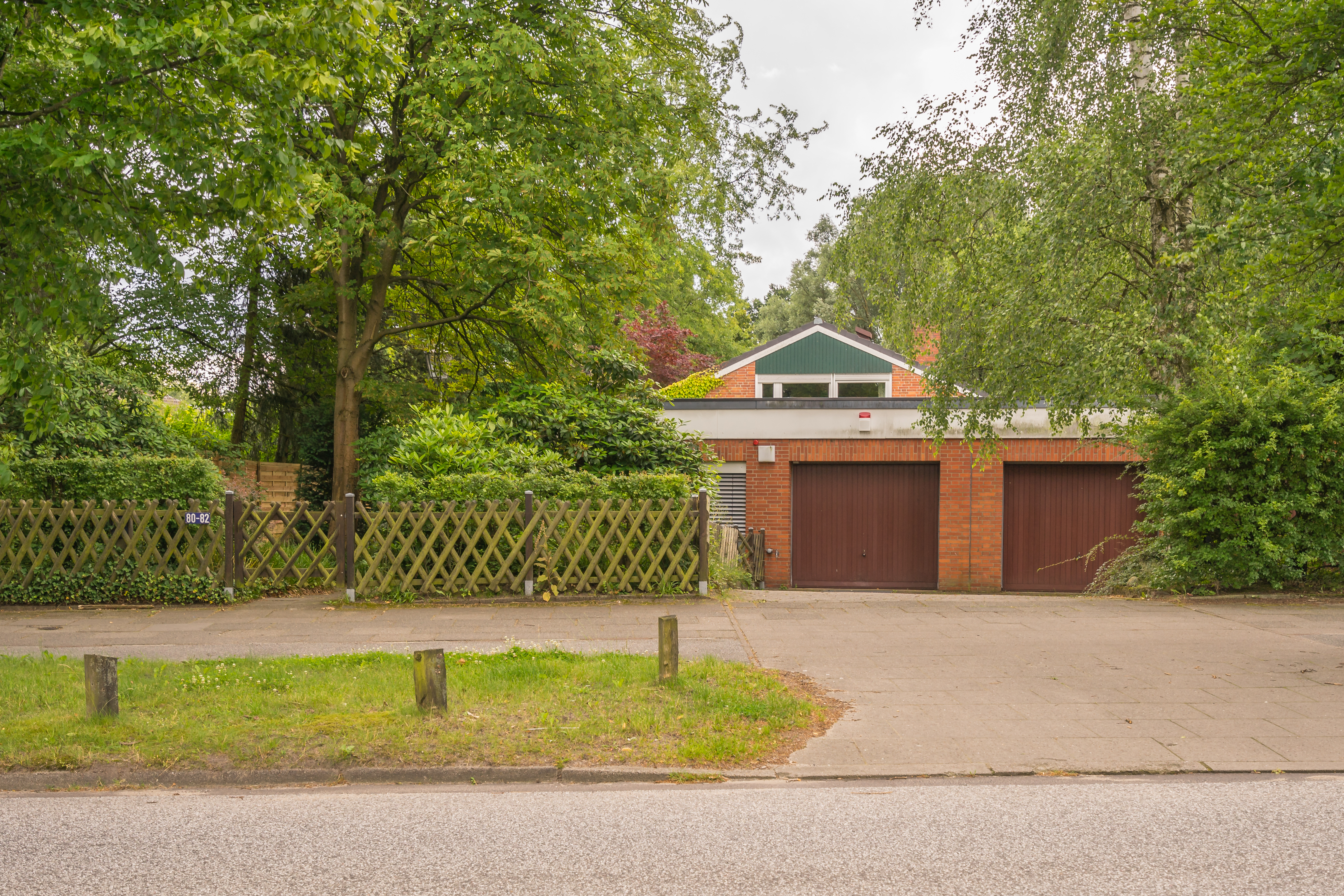 ehemaliges Wohnhaus von Helmut und Loki Schmidt, Neubergerweg 80 in Hamburg-Langenhorn, Ansicht von der Straße